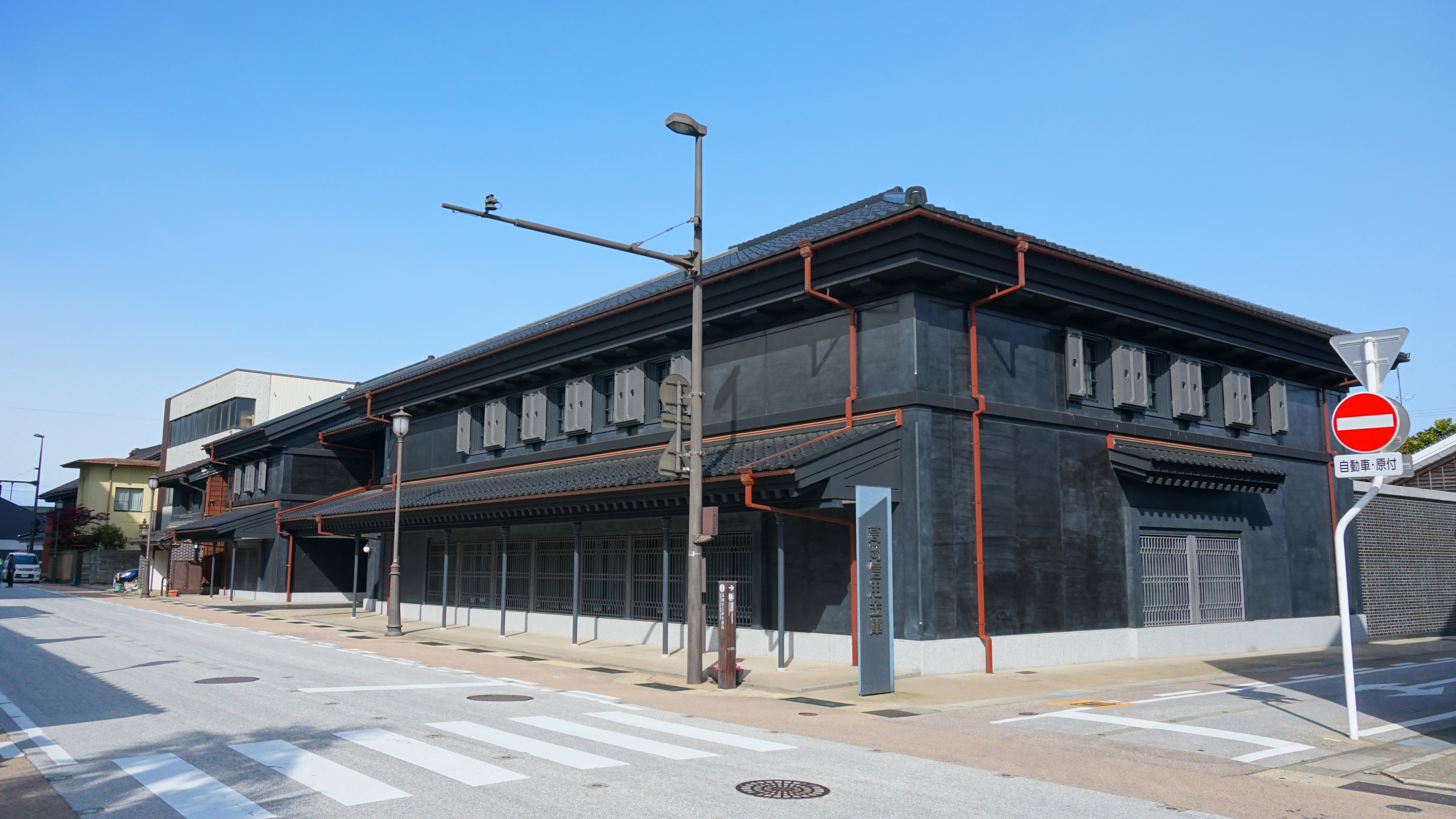 高岡信用金庫本店。旧本店の老朽化によって建て替えられ、2017年に竣工した全く新しい土蔵建築である。周囲は国の重要伝統的建造物群保存地区に指定されているため、景観と調和する建築が志向された。